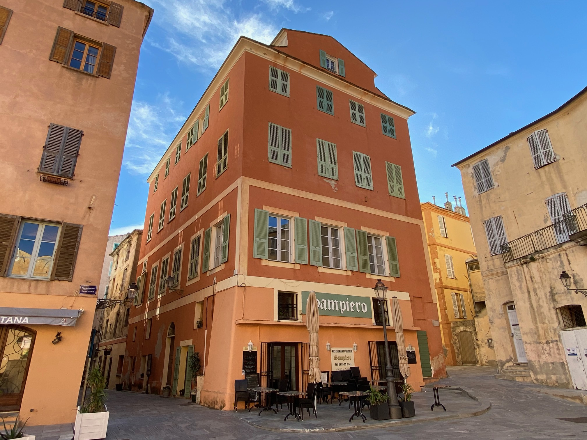 Corsu: A casa Zerbi, piazza di Corte, in citatella di Bastia, Corsica